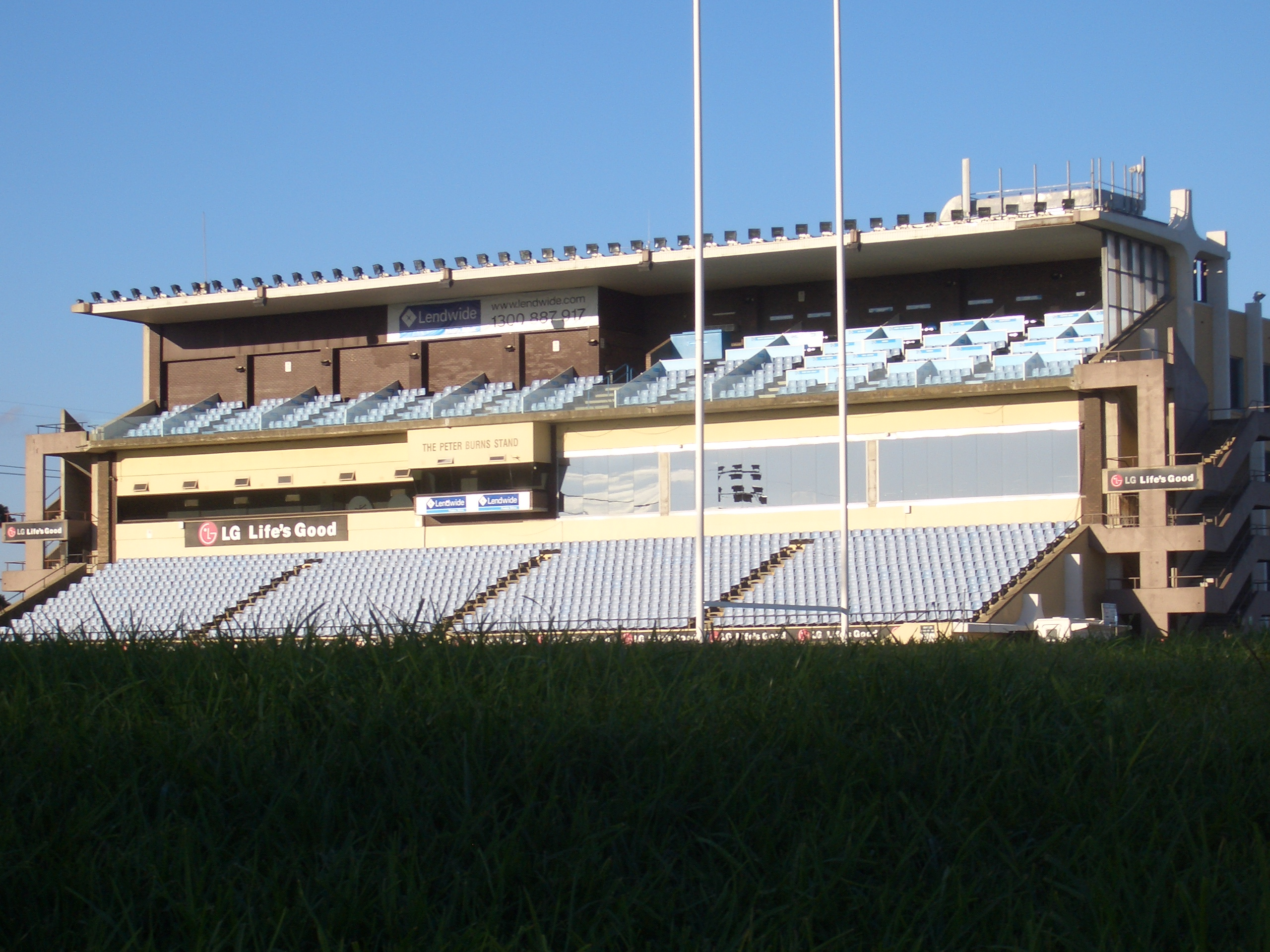 Woolooware Endeavour Field